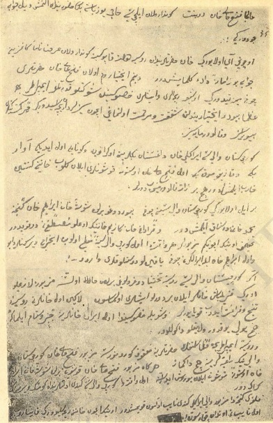 Фотокопия с письма посланника Кубинского ханства юзбаши Гаджи-бека к генерал-поручику П. С. Потёмкину с ходатайством о запрещении вмешательства царя Восточной Грузии Ираклия II в дела азербайджанских ханств